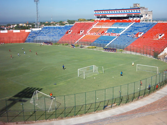 Estadio General Pablo Rojas "La Nueva Olla" (Asunción, Paraguay)